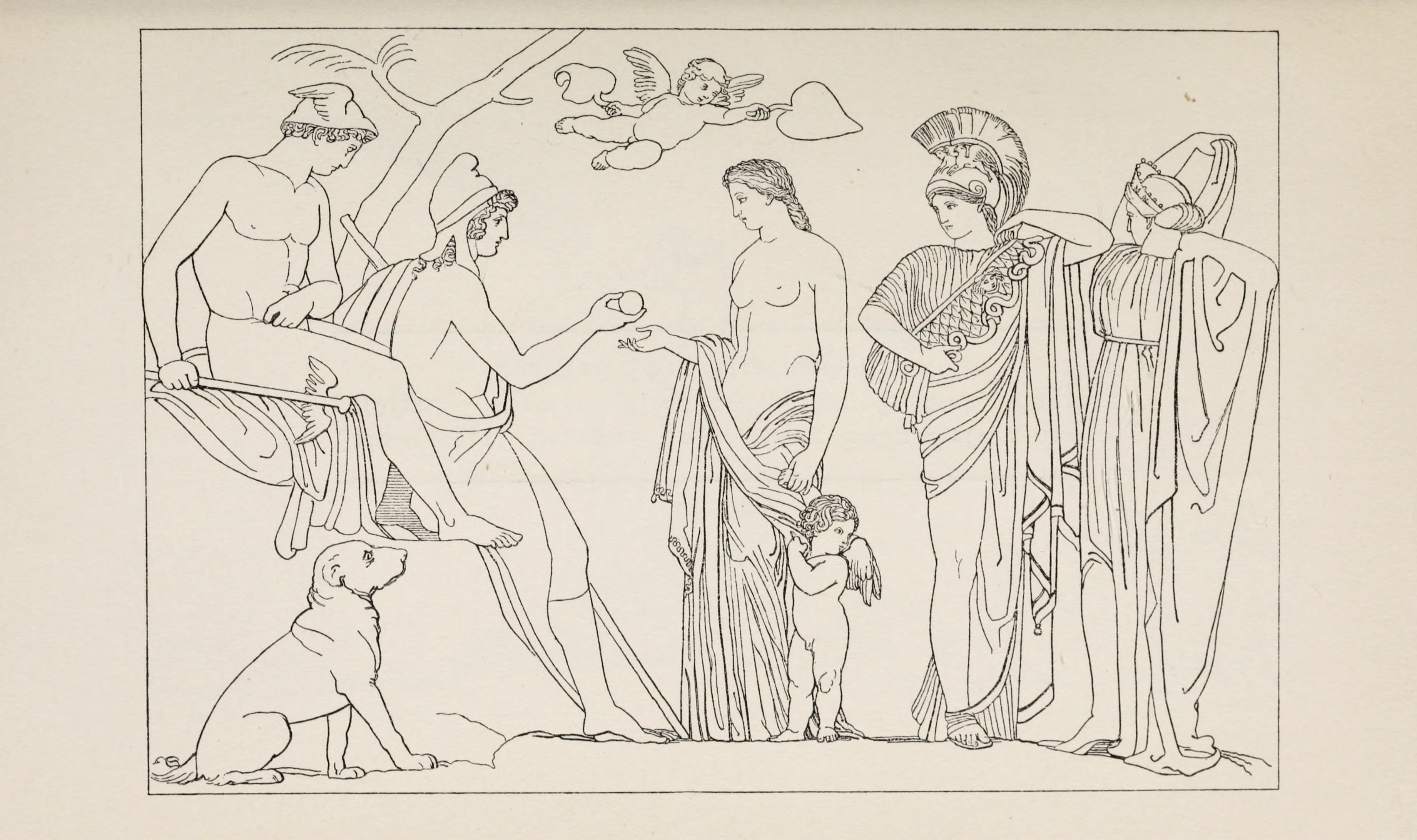 Das Parisurteil (von links nach rechts Hermes, Paris, Aphrodite, Eros, Athene, Hera). – Homeros, Ilias XXIV. 30. Schwab, Sagen des klassischen Altertums I. 329.